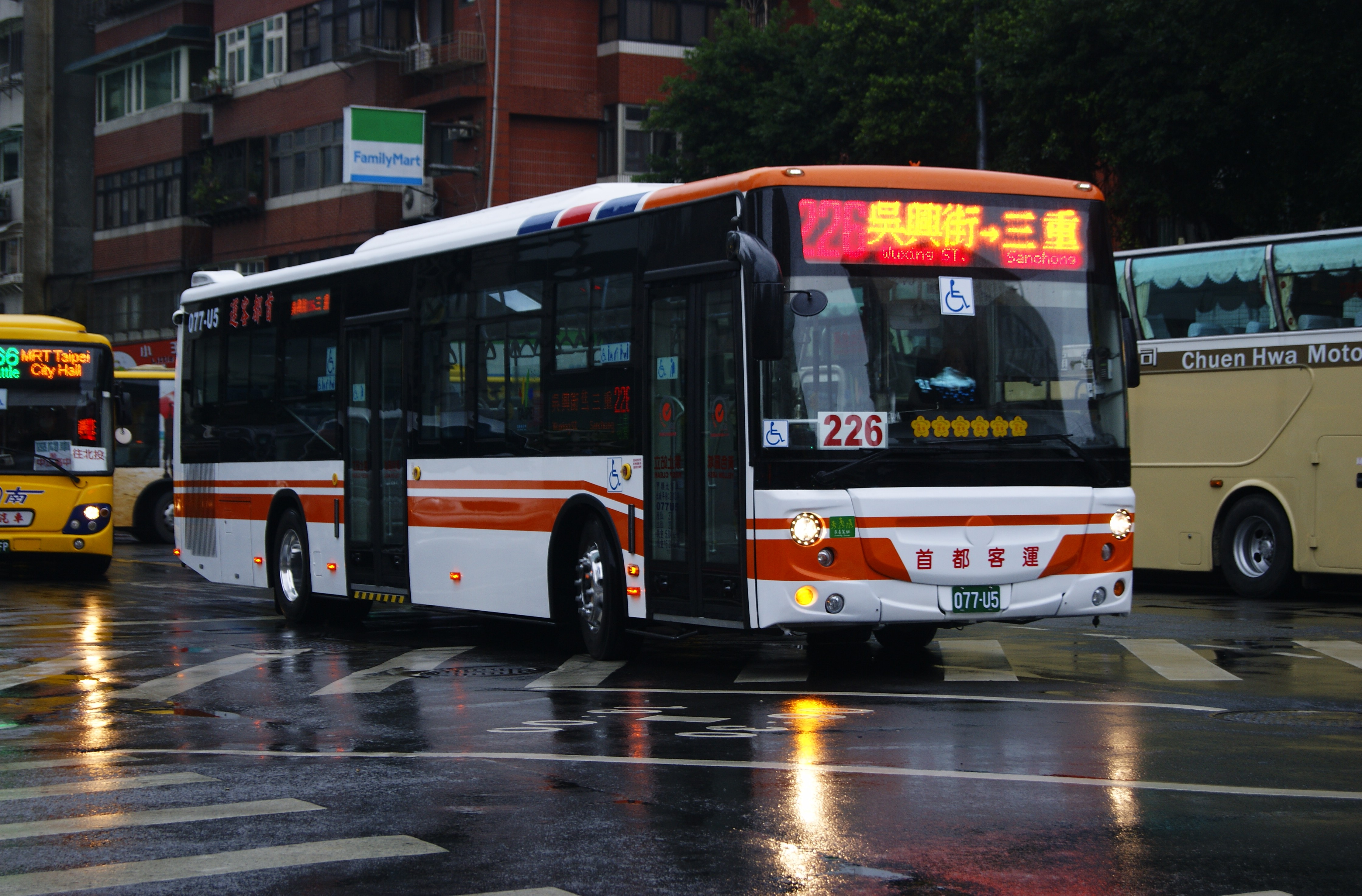 中文（台灣）: 首都客運福田柴油低地板公車077-U5於臺北市信義區松仁路底